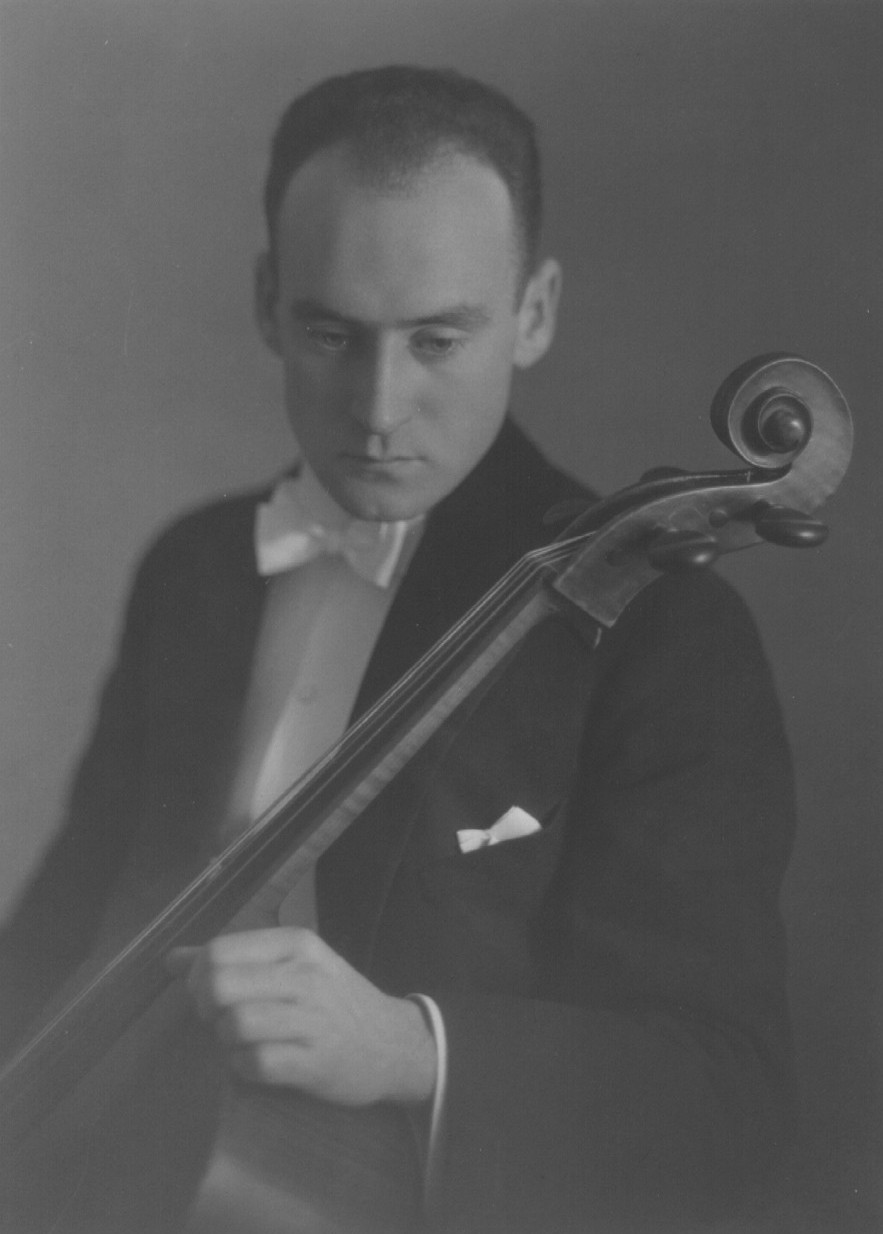 Ateljé-fotografi, 1925